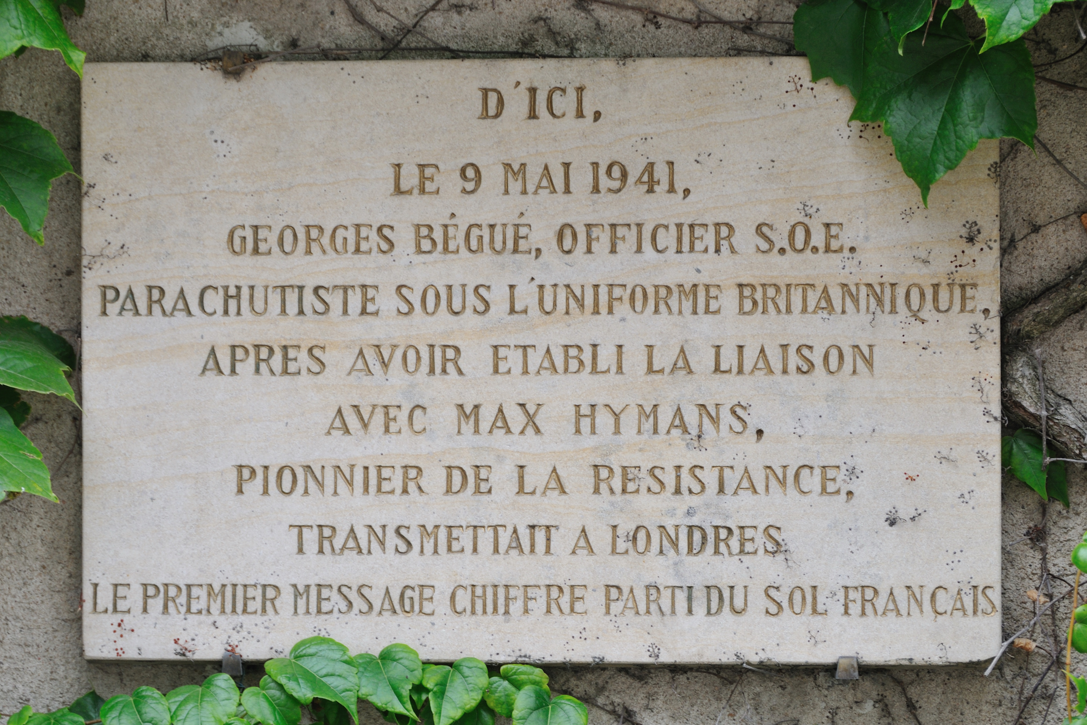 Plaque commémorative, 14 rue des Pavillons, Châteauroux, Indre, France Cette plaque commémore la transmission le 9 mai 1941 par Georges Bégué du premier message chiffré envoyé du sol français par la Résistance